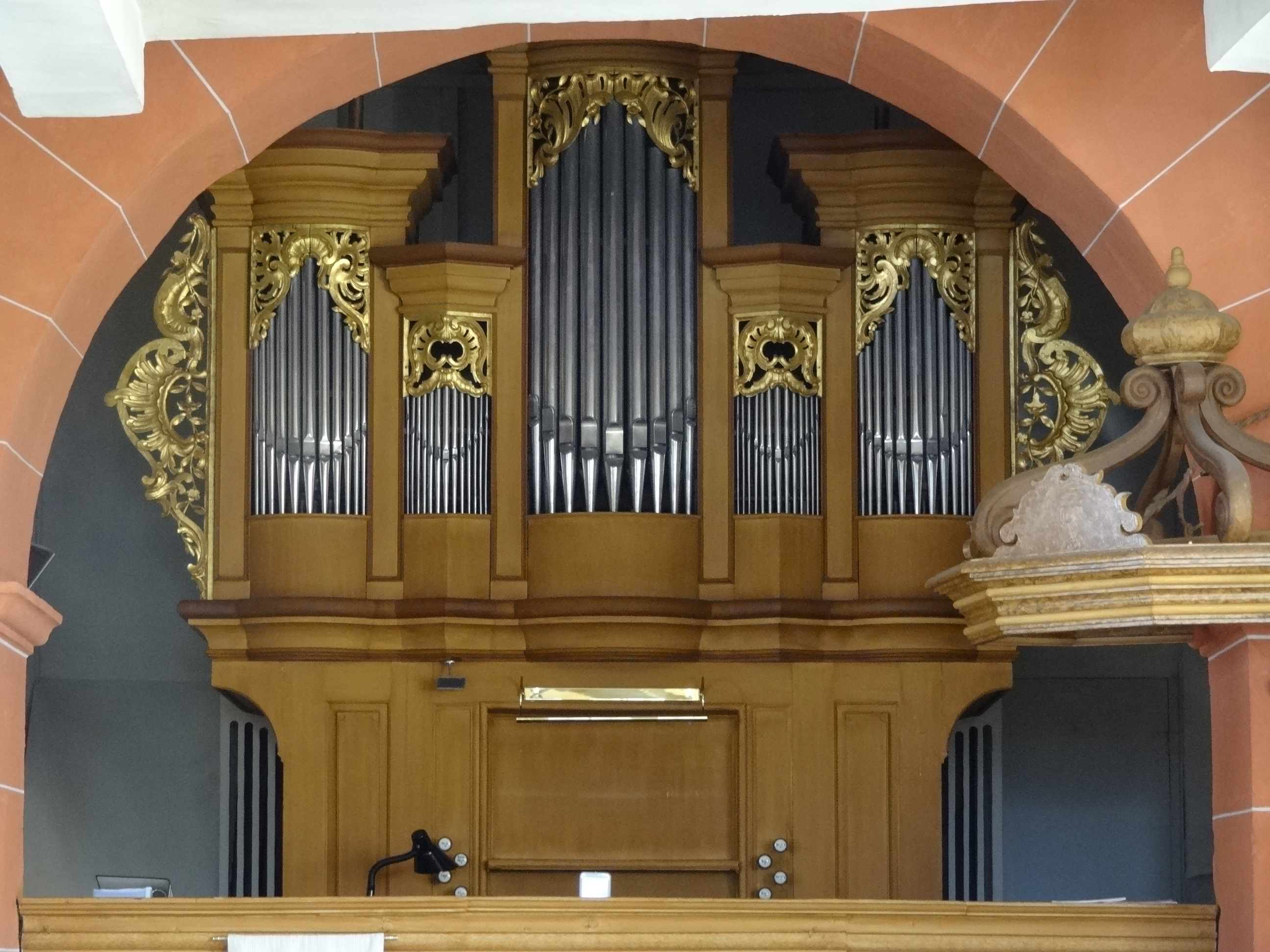 Evangelische Kirche Trais-Horloff